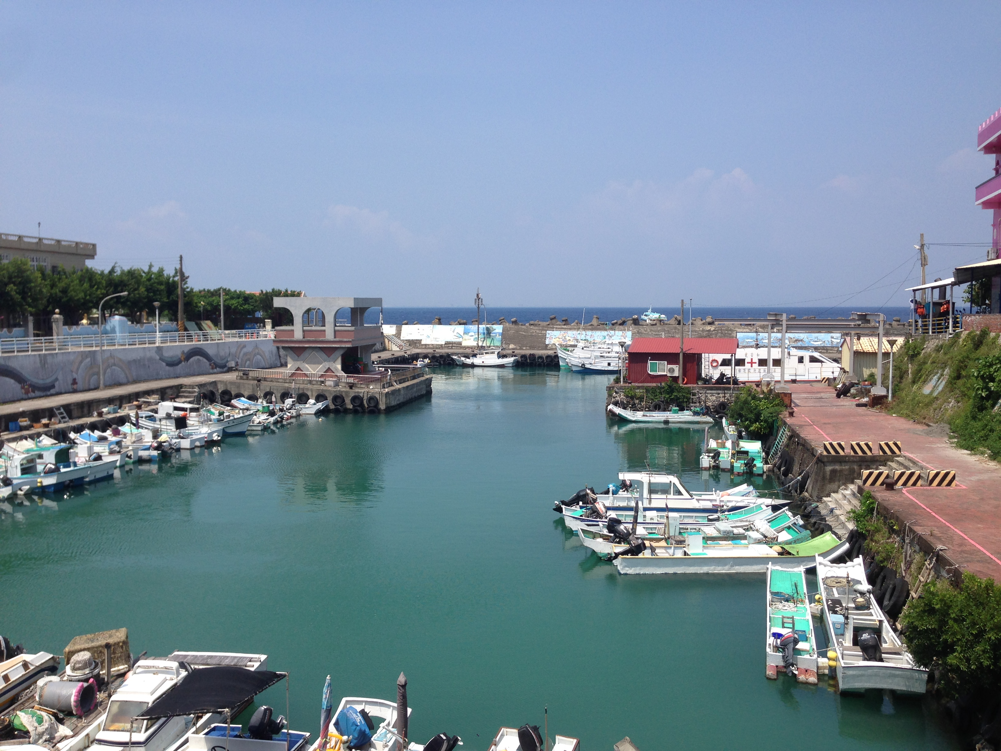 中文（台灣）: 小琉球白沙尾港